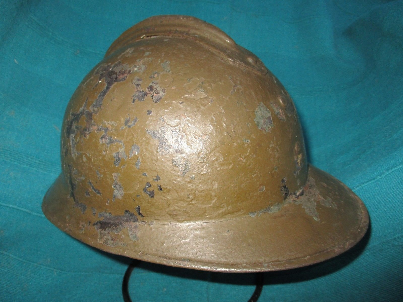 Casco Adrian italiano Modelo 1915-1916 Lippmann, de la Guerra Civil Española.